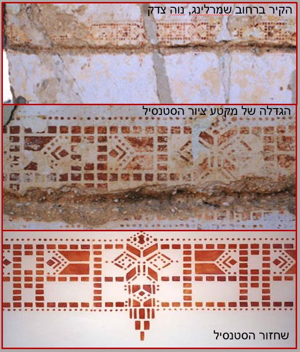 ציור הקיר הראשון אשר שי פרקש זיהה בו ציור סטנסיל, נווה צדק, תל-אביב, 1999